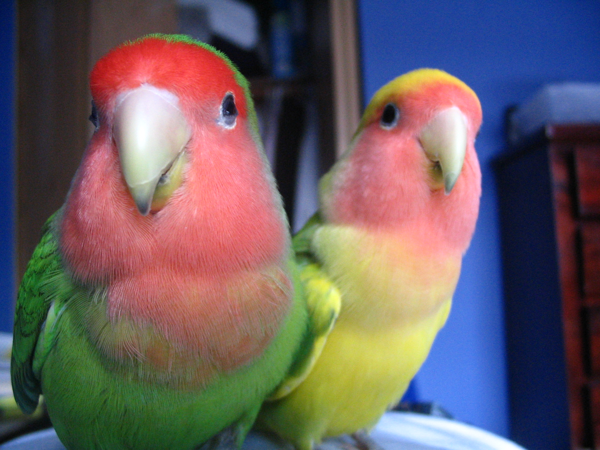 Mutaciones de Agapornis roseicollis amarillas Two peach faced lovebirds. Created 05/23/2006 by Ajit.